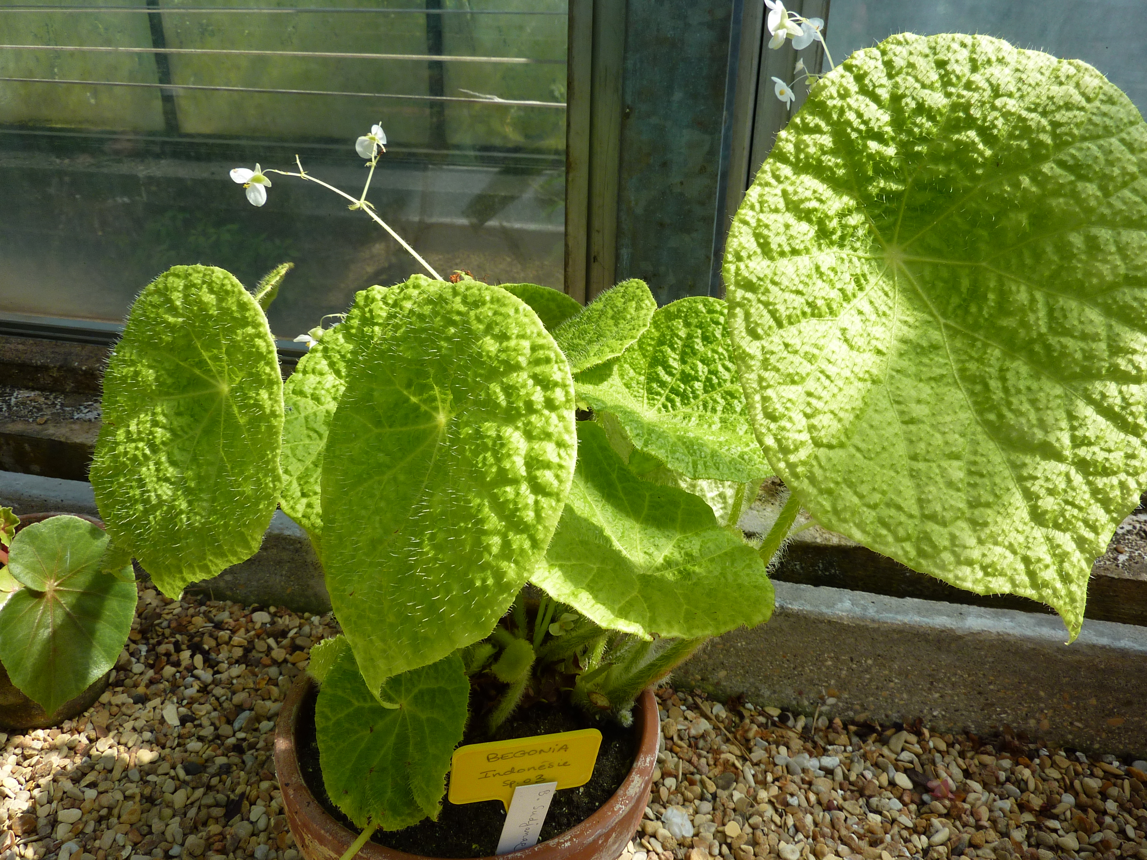 Begonia sudjanae, serres chaudes dAuteuil - Jardin botanique de la Ville de Paris - France